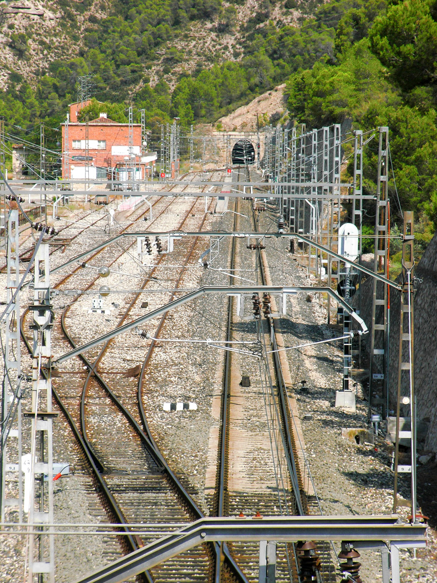 Vista general de la playa de vía de la estación de Fayón-Puebla de Masaluca